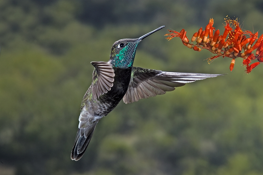 Magnificent Hummingbird (Eugenes fulgens) male, Madera Canyon, Arizona